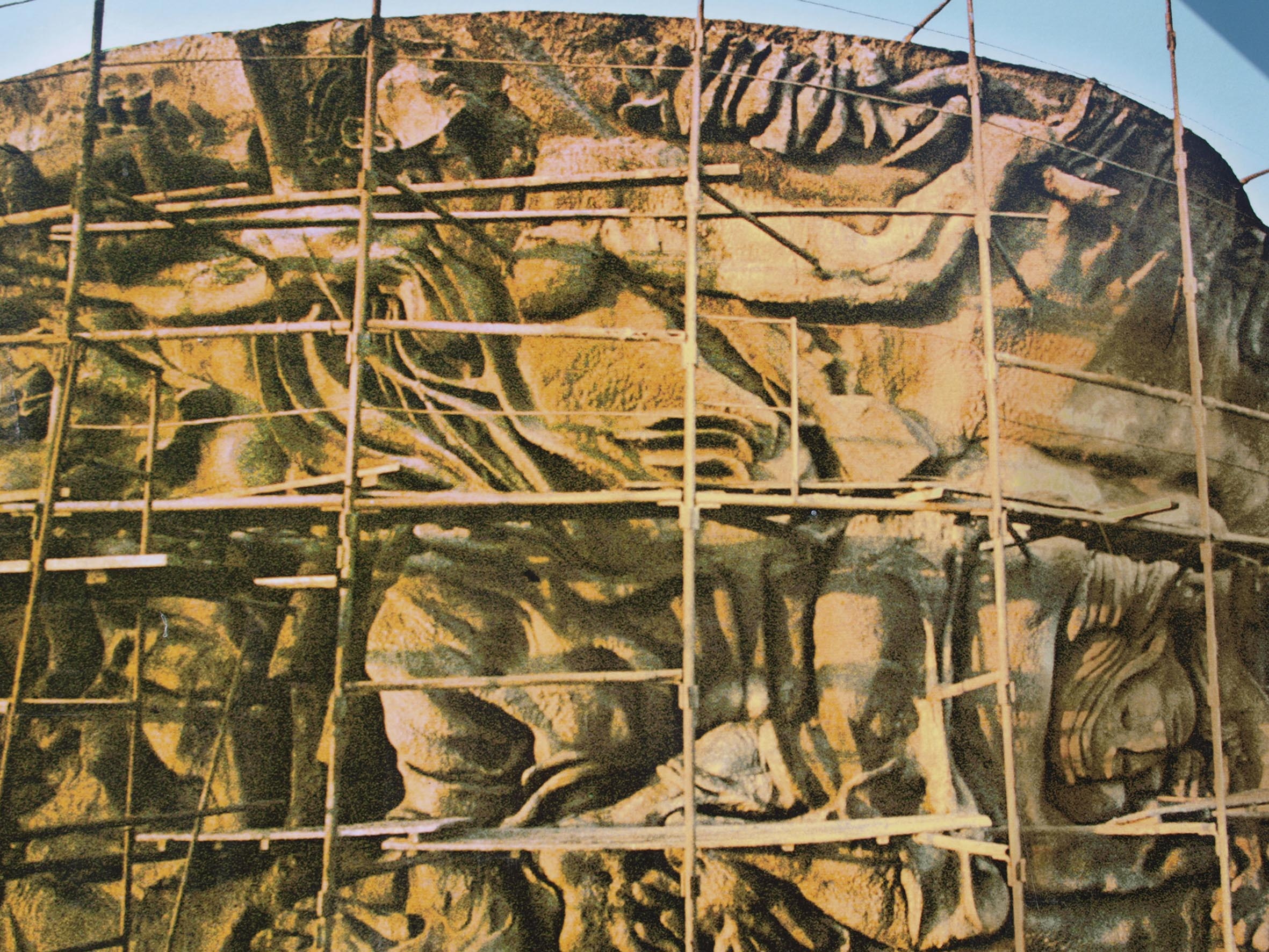 Стіна пам'яті — монументальна композиція, об'ємний горельєф на Байковому цвинтарі у Києві, пам'ятка радянського модернізму.